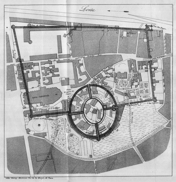 Plan faisant apparaître la structure de l'amphithéâtre de Tours dans le castrum gallo-romain et le périmètre du castrum lui-même dans lequel on peut situer le château de Tours tel qu'il est actuellement à l'angle nord-ouest, par Courtigis (1855).Dans André Salmon, L'amphithéâtre de Tours d'après les chartes, Bibliothèque de l'école des chartes, 1857, vol. 18, p. 216